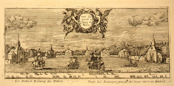 "ueue du / grand es / tang du / Retire (sic) / Le Grand Estanq du Retire. Vista del Estanque grande del buen retiro de Madrid" Entre 1665 y 1668. Grabado. Papel blanco y negro, buril. 106 x 221 mm. Pertenece a la colección de estampas del Museo de Historia de Madrid.